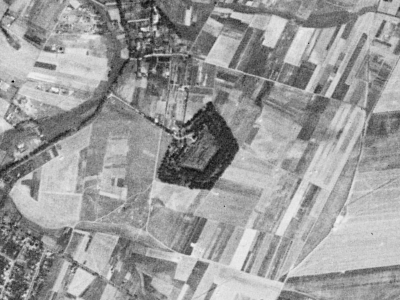 Fort IIa Twierdzy Poznań sfotografowany przez satelitę KH-4A 1023, 23 sierpnia 1965 r.